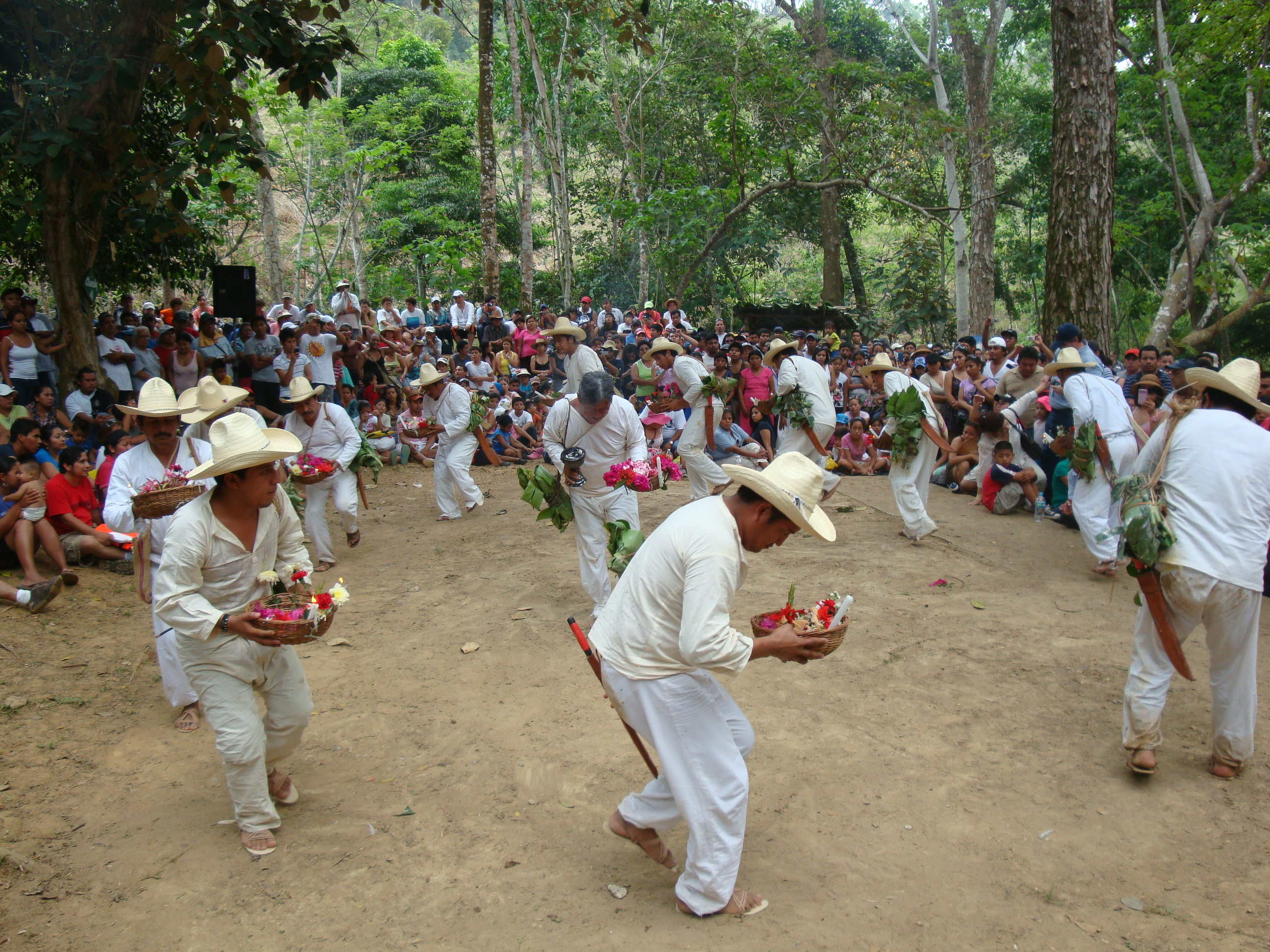 Escena de la danza de "Las Sardinas", la cual se baila en la comunidad zoque de Tapijulapa, municipio de Tacotalpa. Es una de las danzas más importantes y autóctonas del estado de Tabasco, México.